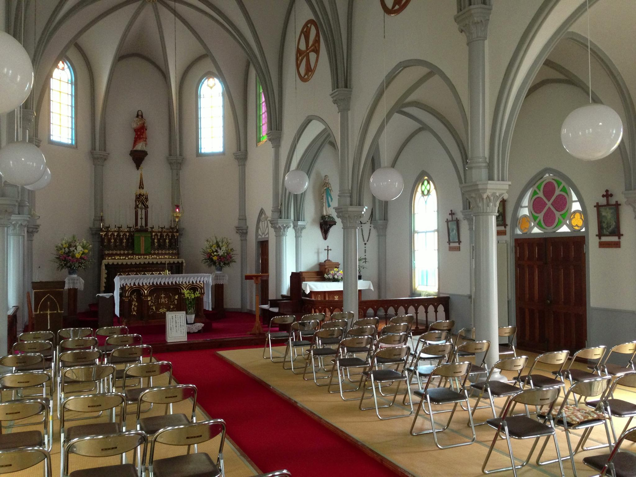 崎津天主堂内部